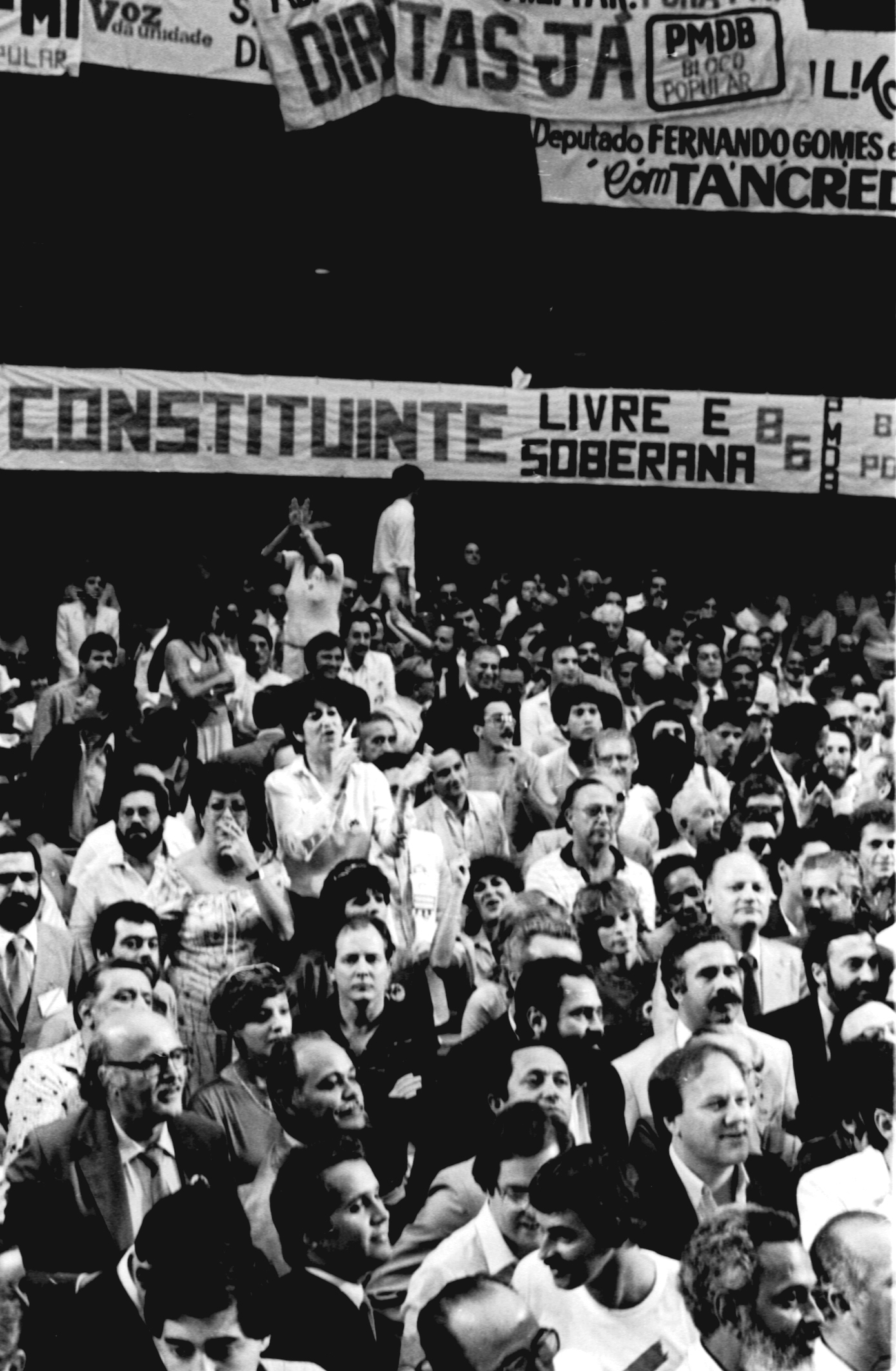 Manifestações pelas eleições diretas para a presidência da República no Plenário da Câmara dos Deputados. Abril de 1984. Fotógrafo: Célio Azevedo.